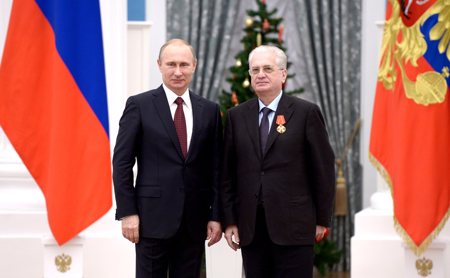 Награждение Пиотровского Михаила Борисовича орденом Александра Невского. Церемония вручения государственных наград Российской Федерации 22 декабря 2014 года